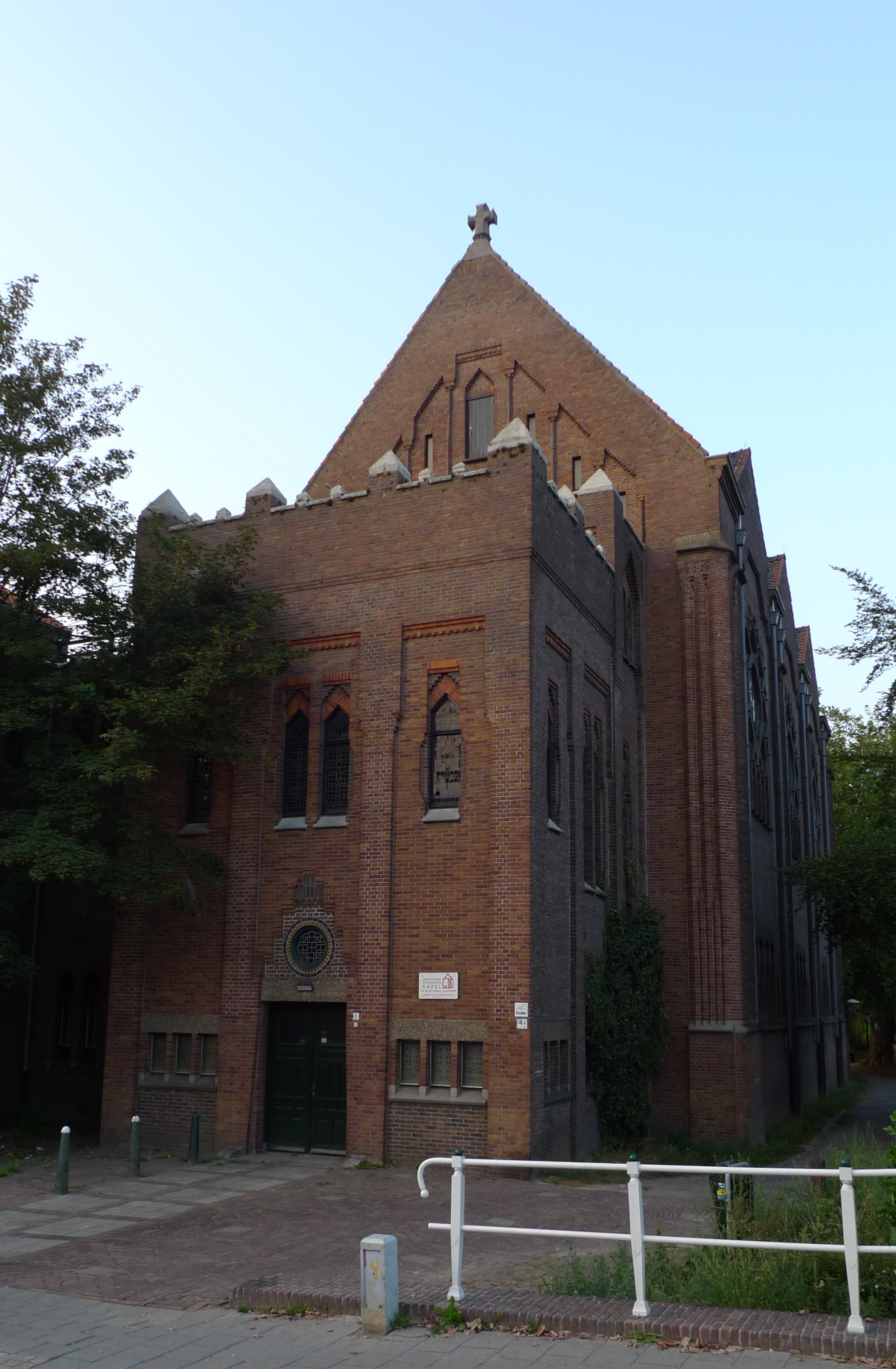 Kapel van het voormalig Augustinianum in Eindhoven, Nederlands rijksmonument nr. 518791